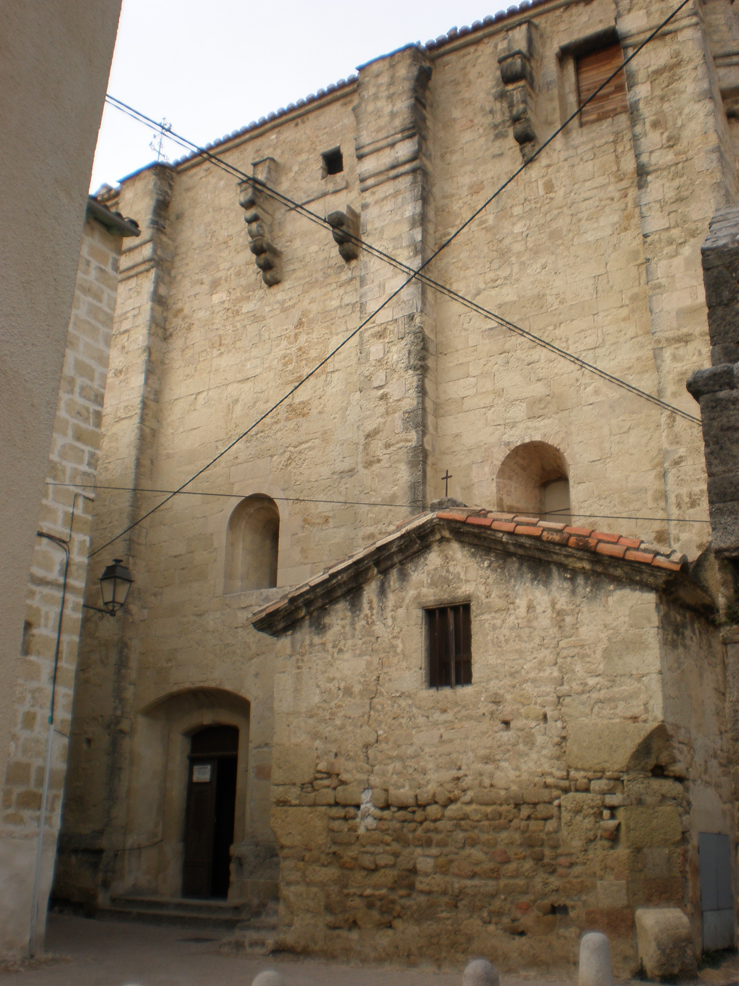 Eglise Sainte-Croix de Celleneuve à Montpellier (France)